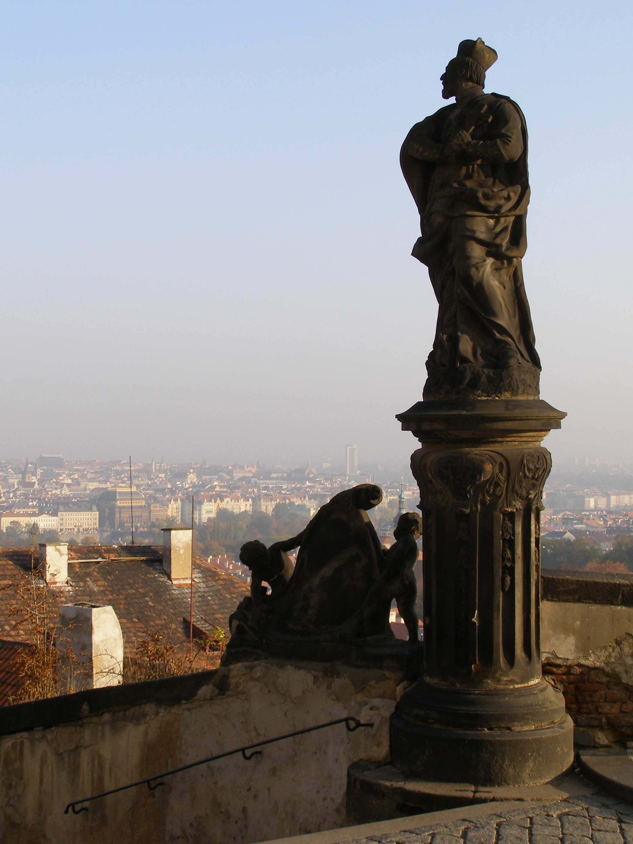 Socha sv. Filipa Nerejského, Praha 1, Hradčanské náměstí